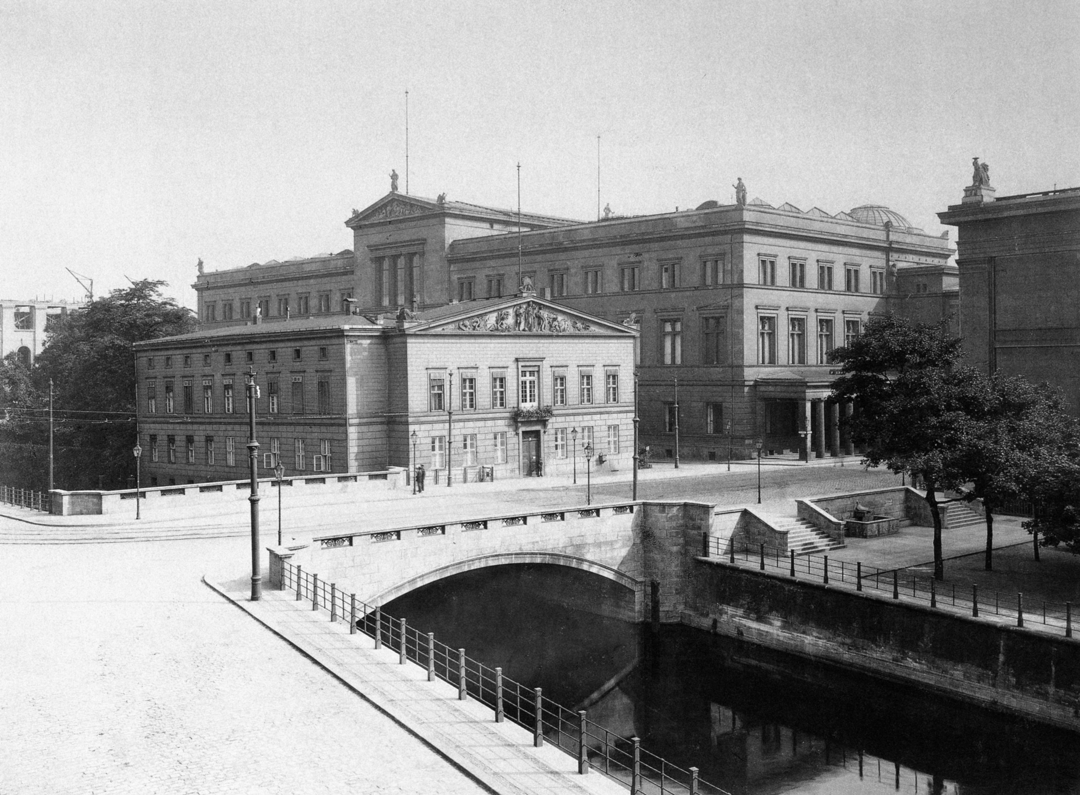 Eiserne Brücke über den Kupfergraben (Spree) in Berlin